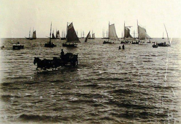 Vista del Río de la Plata y barcos fondeando en el Puerto de Buenos Aires, ca. 1880.